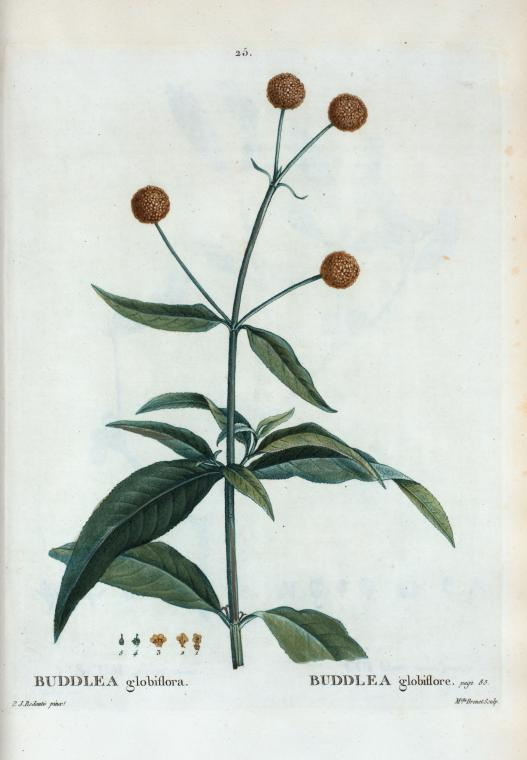 Buddlea globiflora = Buddlea globiflore.